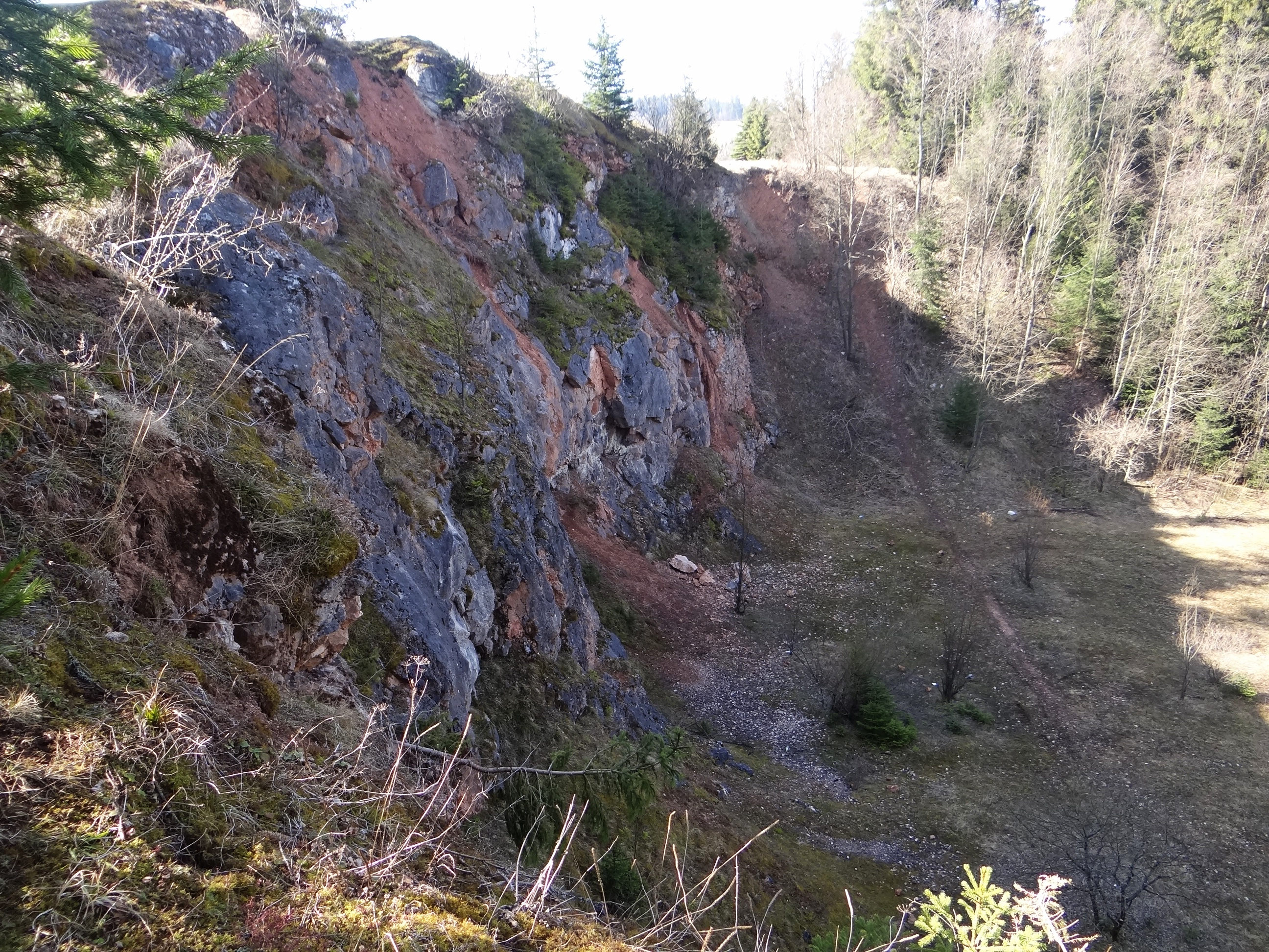 Rezerwat przyrody Rogoźnicka Skałka